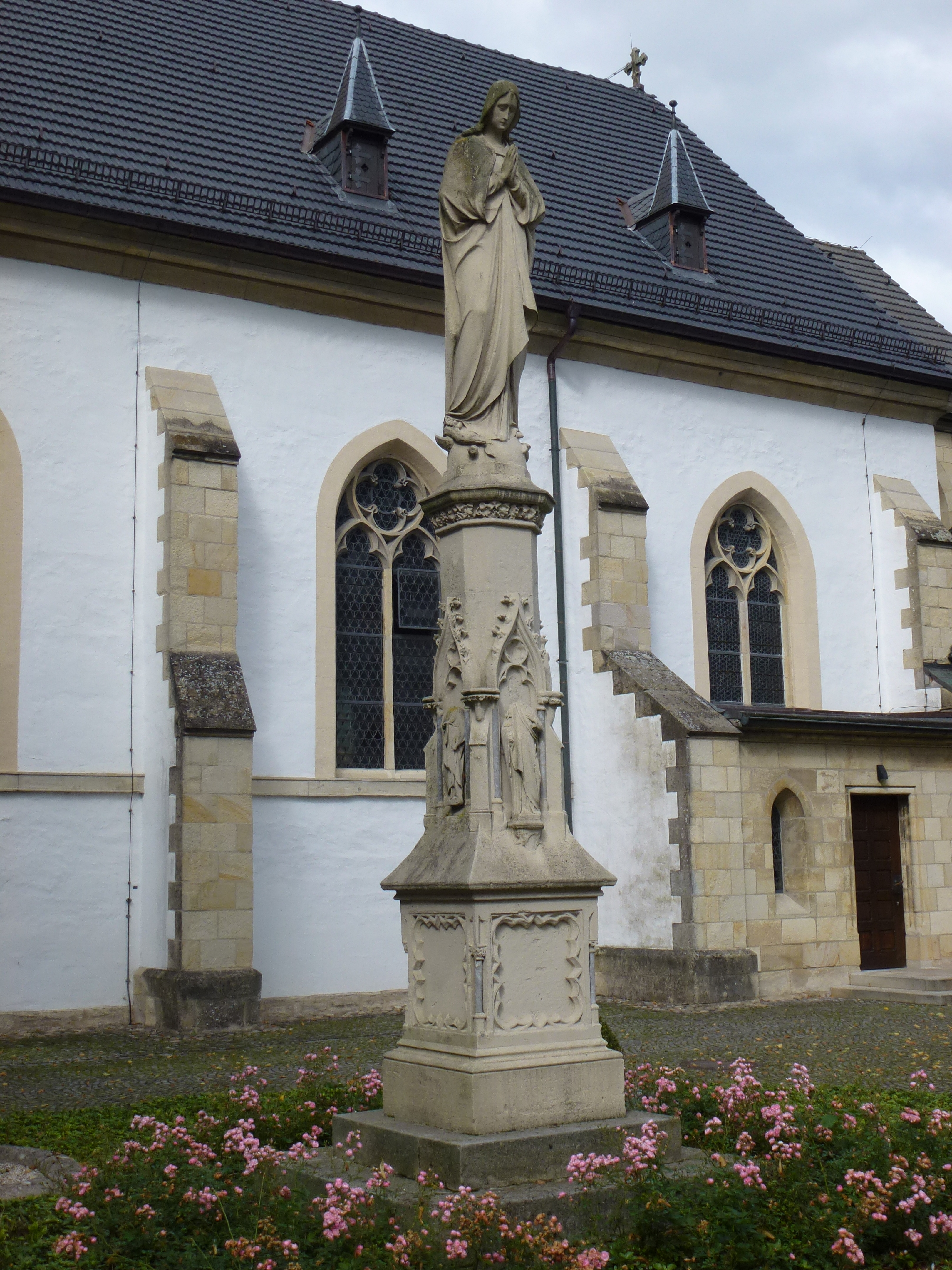 Marienfigur, Kirchplatz, Nottuln-Appelhülsen This is a photograph of an architectural monument.